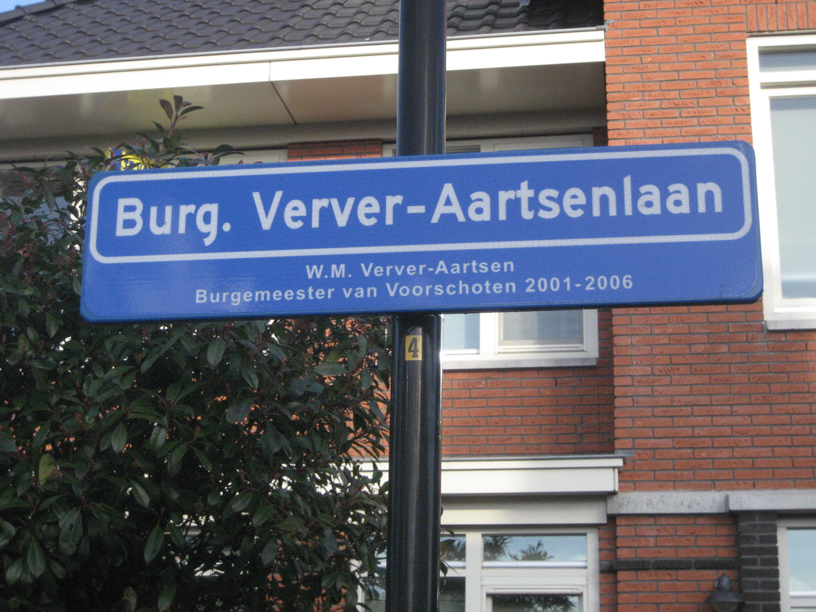 Burgemeester Verver-Aartsenlaan, 2254 BA Voorschoten, Nederland